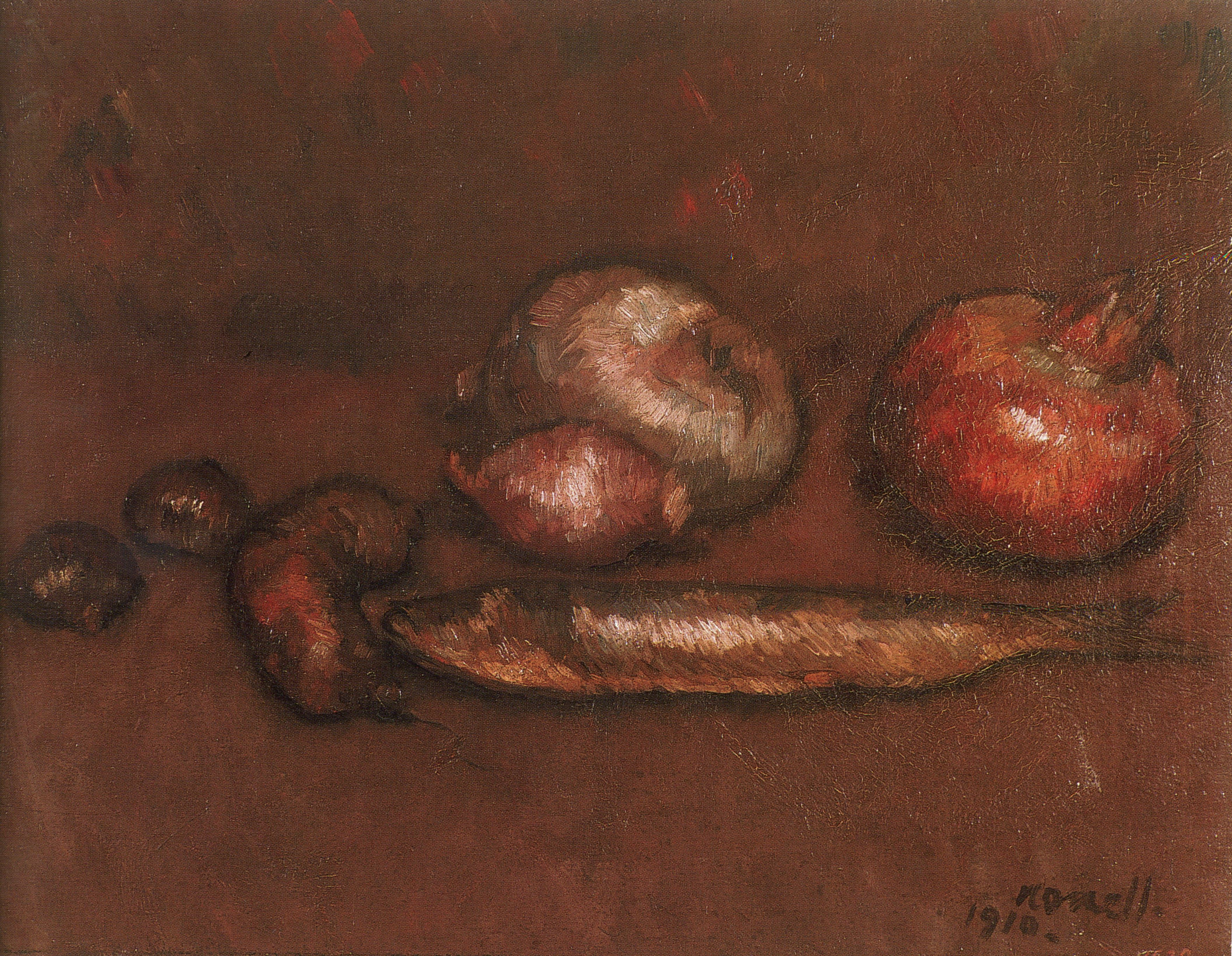 Natura morta d'arengada. pintura sobre tela. Biblioteca Museu Víctor Balaguer